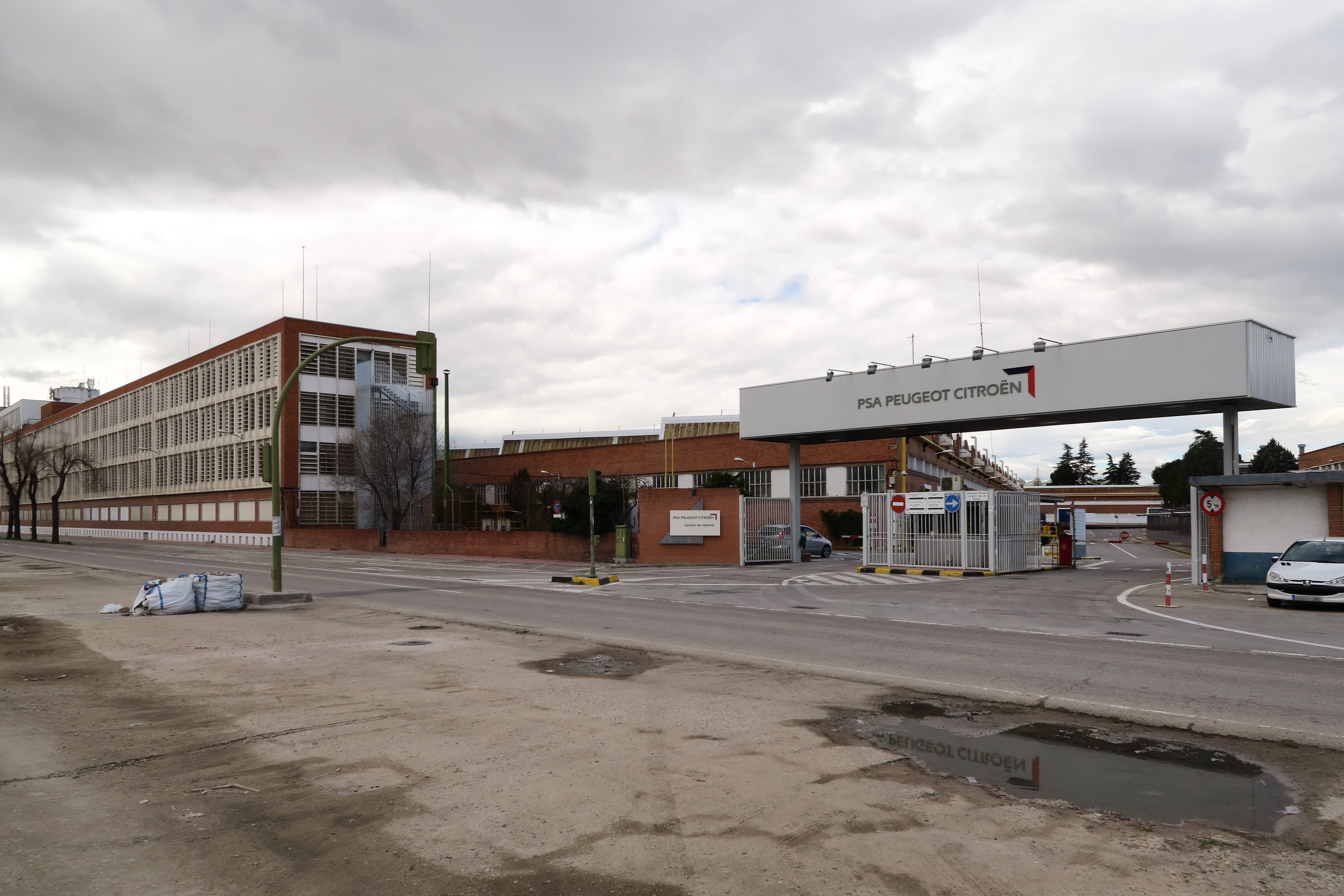 Fábrica PSA de Madrid, entrada principal